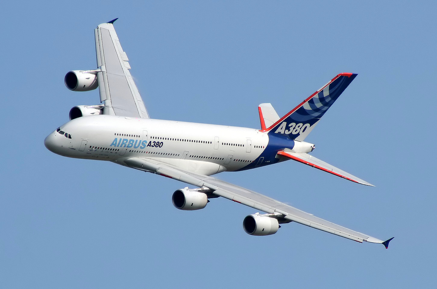 Airbus A380 in Linkskurve über Toulouse